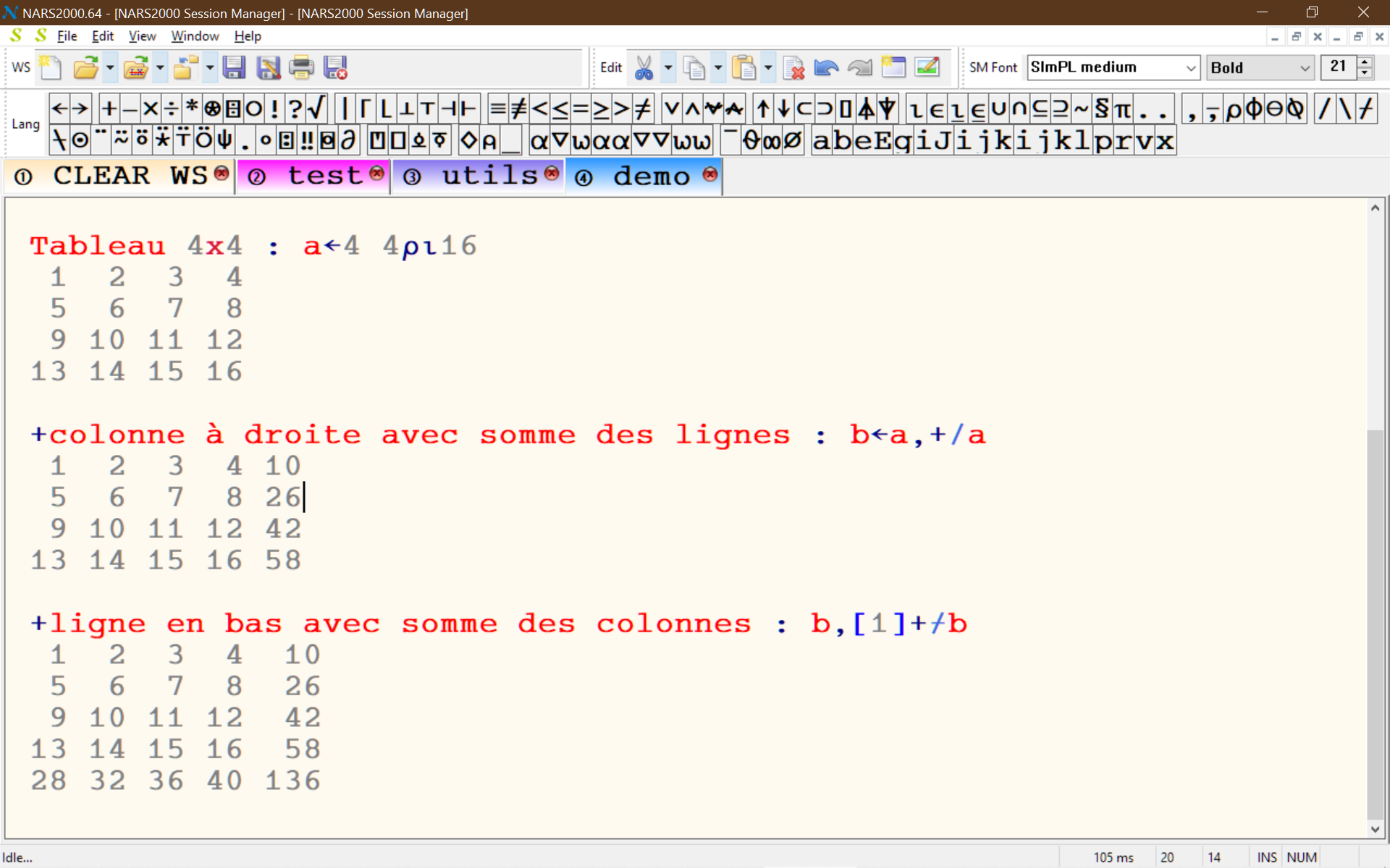 C'est un exemple de dialogue en APL. Il remplace une version précédente où les caractères accentués étaient mal rendus.